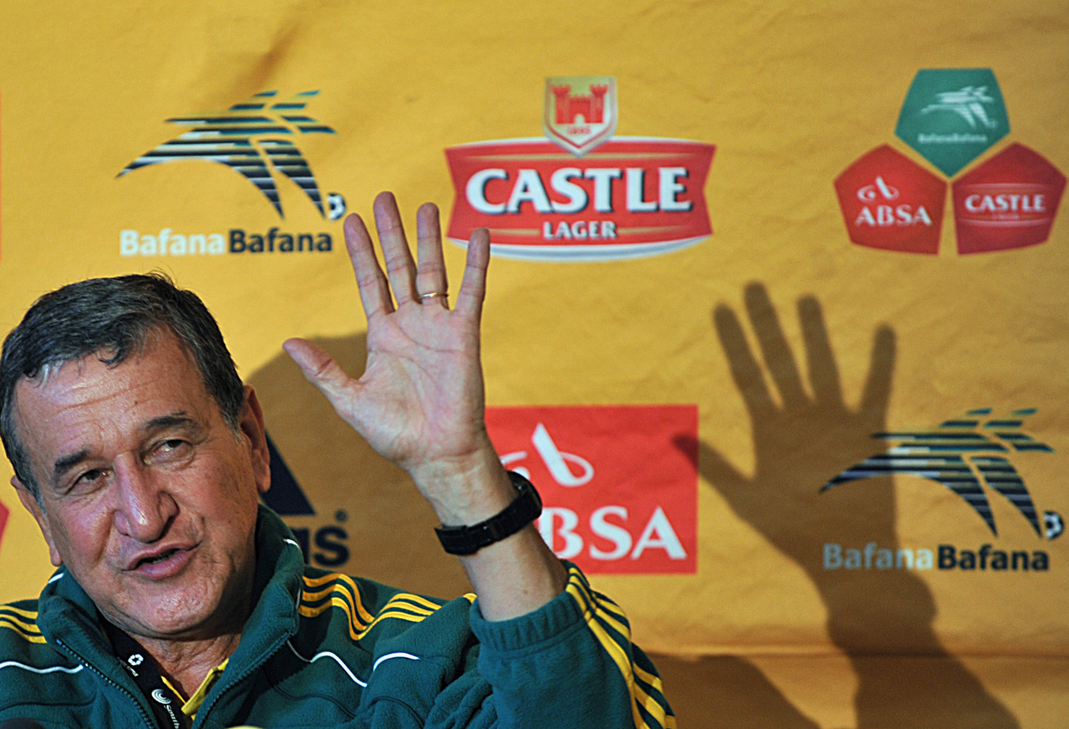 Johannesburgo (África do Sul) - O treinador da África do Sul (Bafana Bafana), o brasileiro Carlos Alberto Parreira, concede entrevista à imprensa, após treino da seleção na Universidade de Witwatersand.